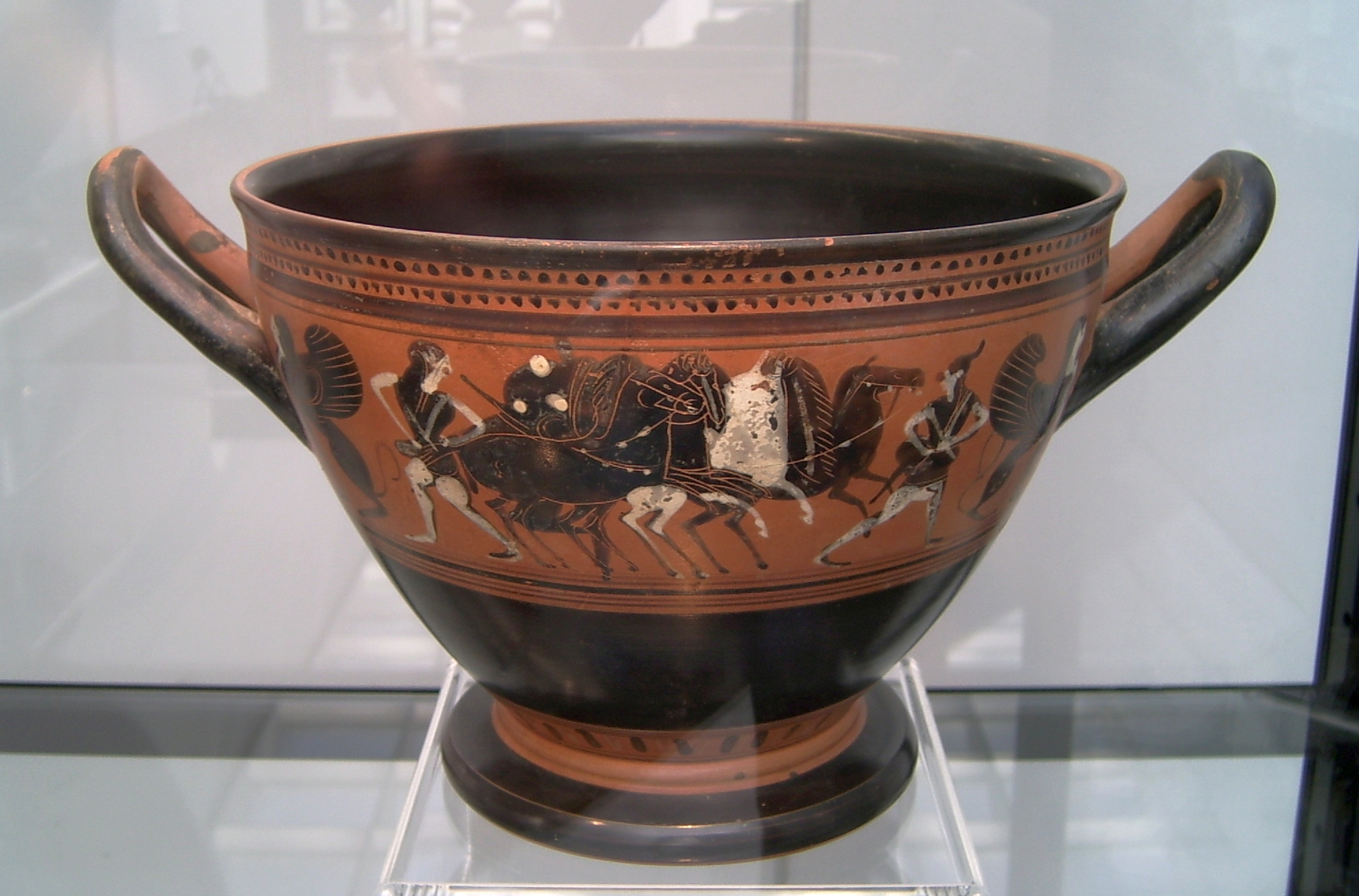 Attisch-schwarzfiguriger Skyphos der CHC-Gruppe, um 500 v. Chr, Höhe 16 cm, Durchmasser 21,8 cm. Das umlaufende Bild zeigt ein nach vorne wendendes Viergespann, Amazonen und Sphingen. Staatliche Antikensammlungen München, Inv.Nr. 9491